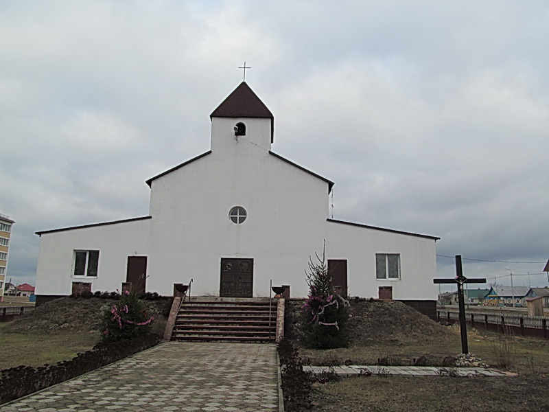 Любань. Касцёл